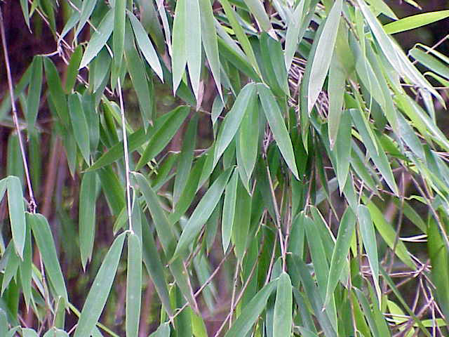 Species: Pseudosasa japonica Family: Poaceae Image No. 2